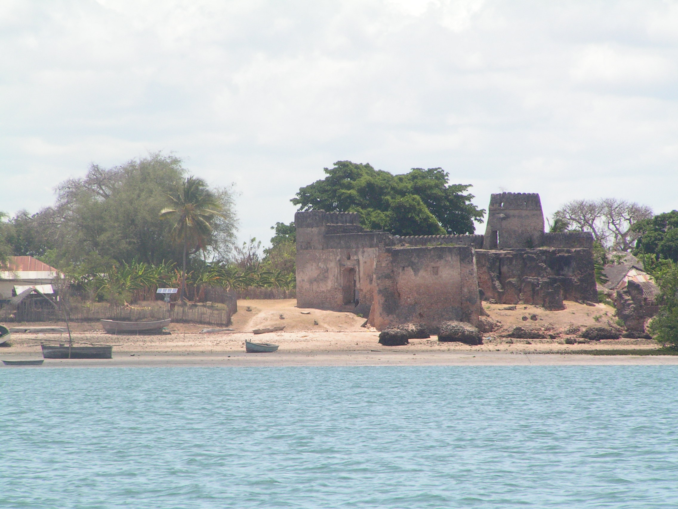 Fort am Ufer von Kilwa Kisiwani